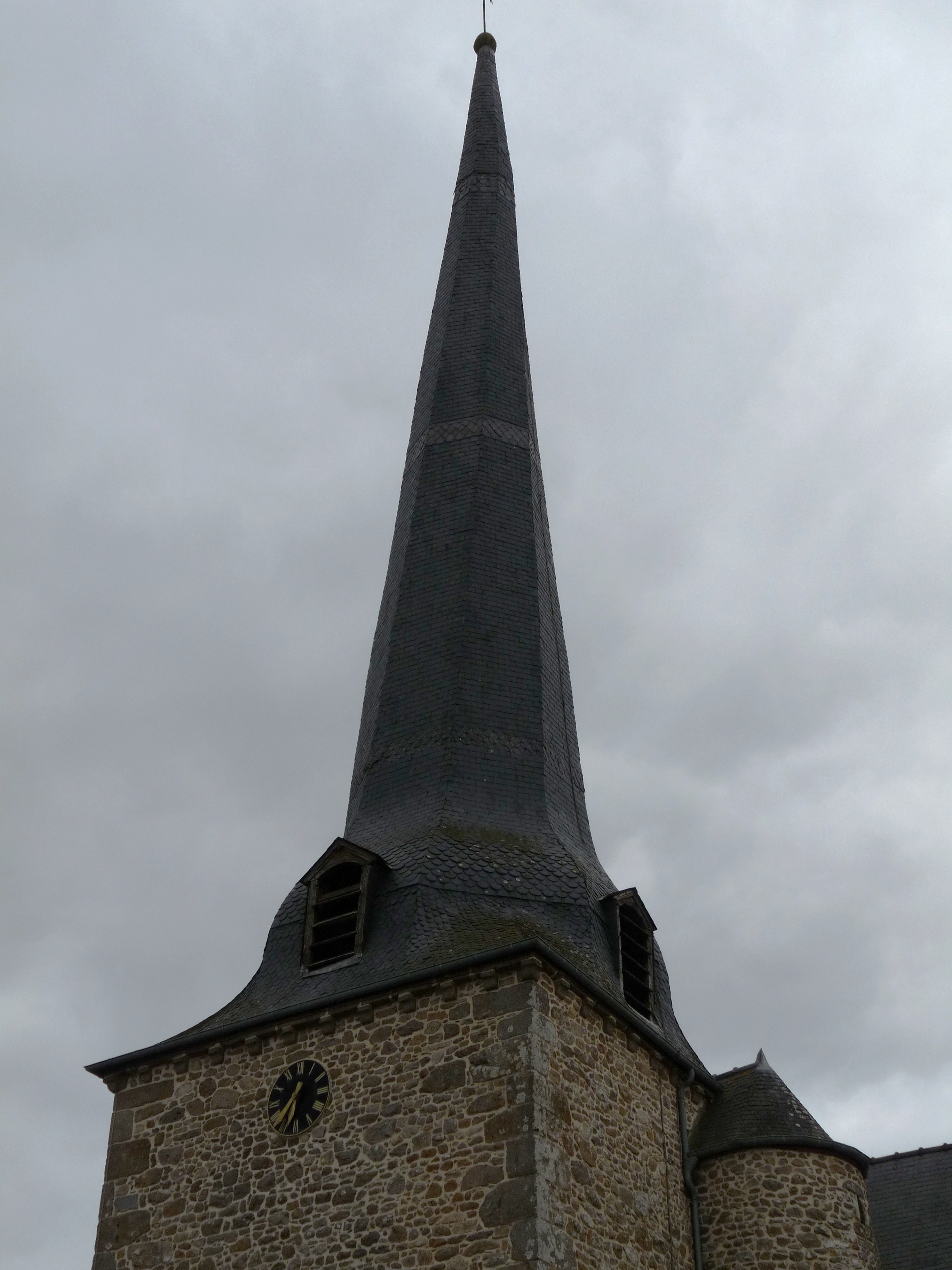 Le clocher tors de Québriac (Ille-et-Vilaine).